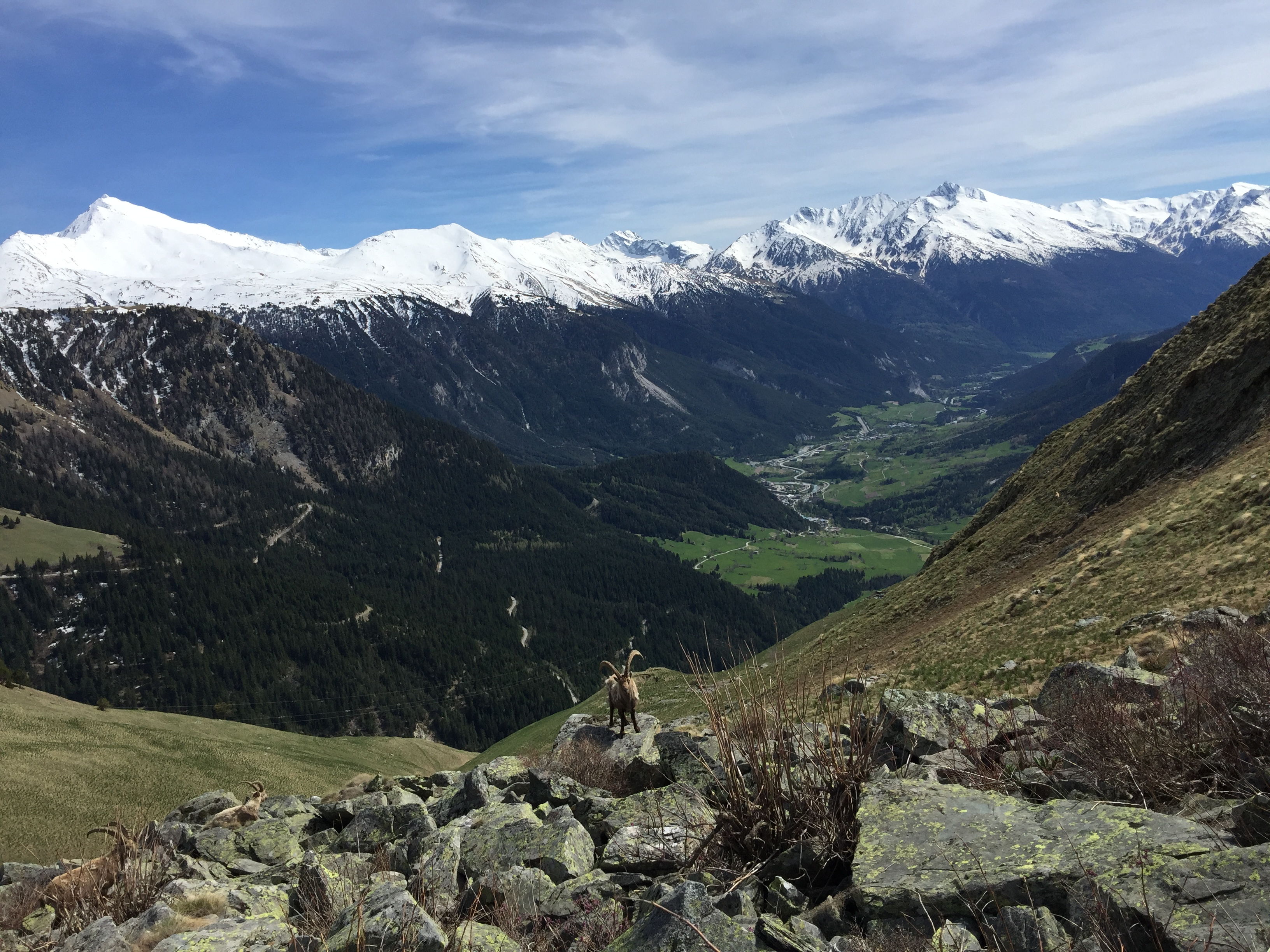 Cône de déjection de Sollieres-Termignon avec un groupe de bouquetins en premier plan et le massif du Mont-Cenis en fond